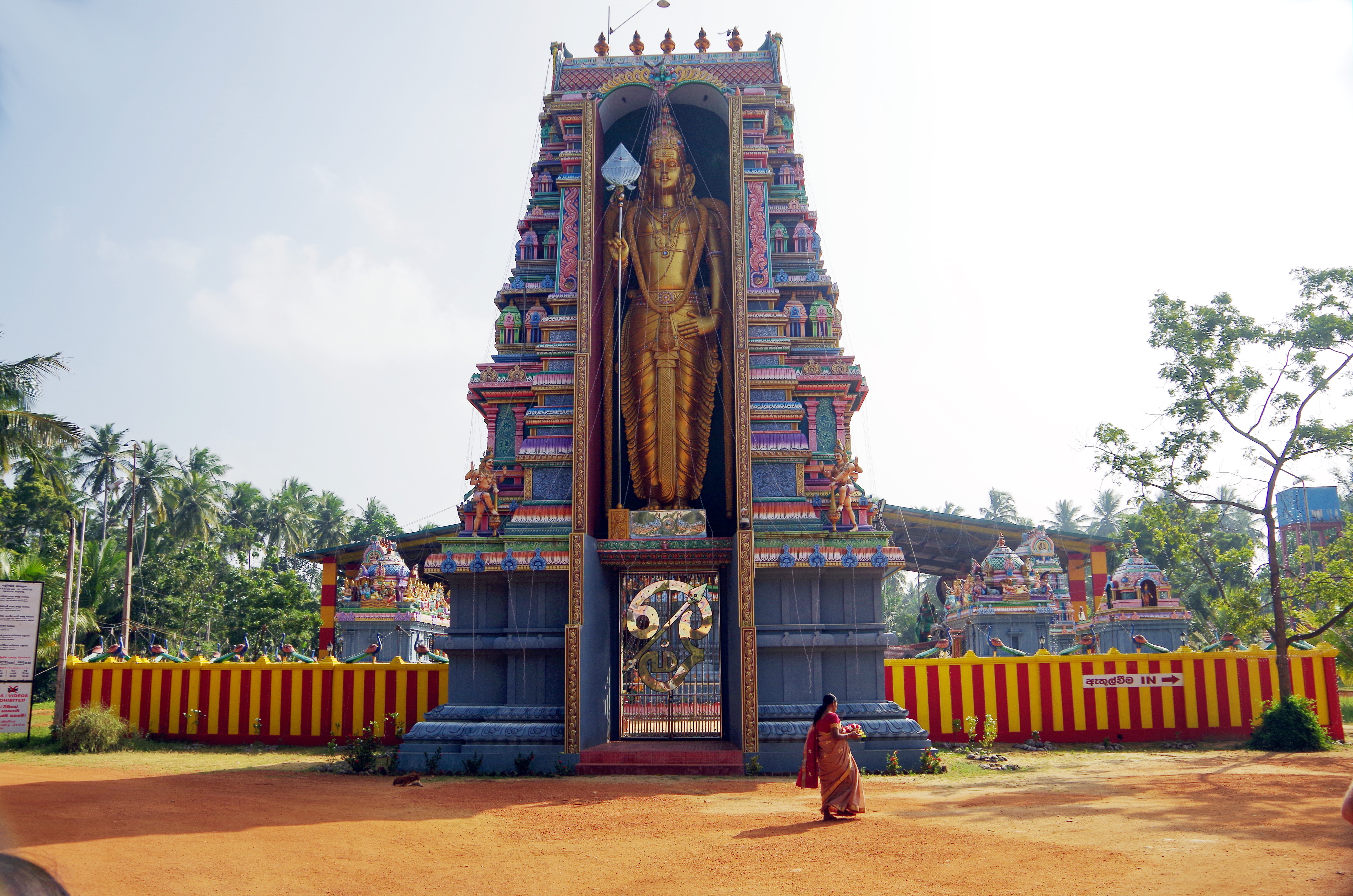 Tenpel bei Munneswaram